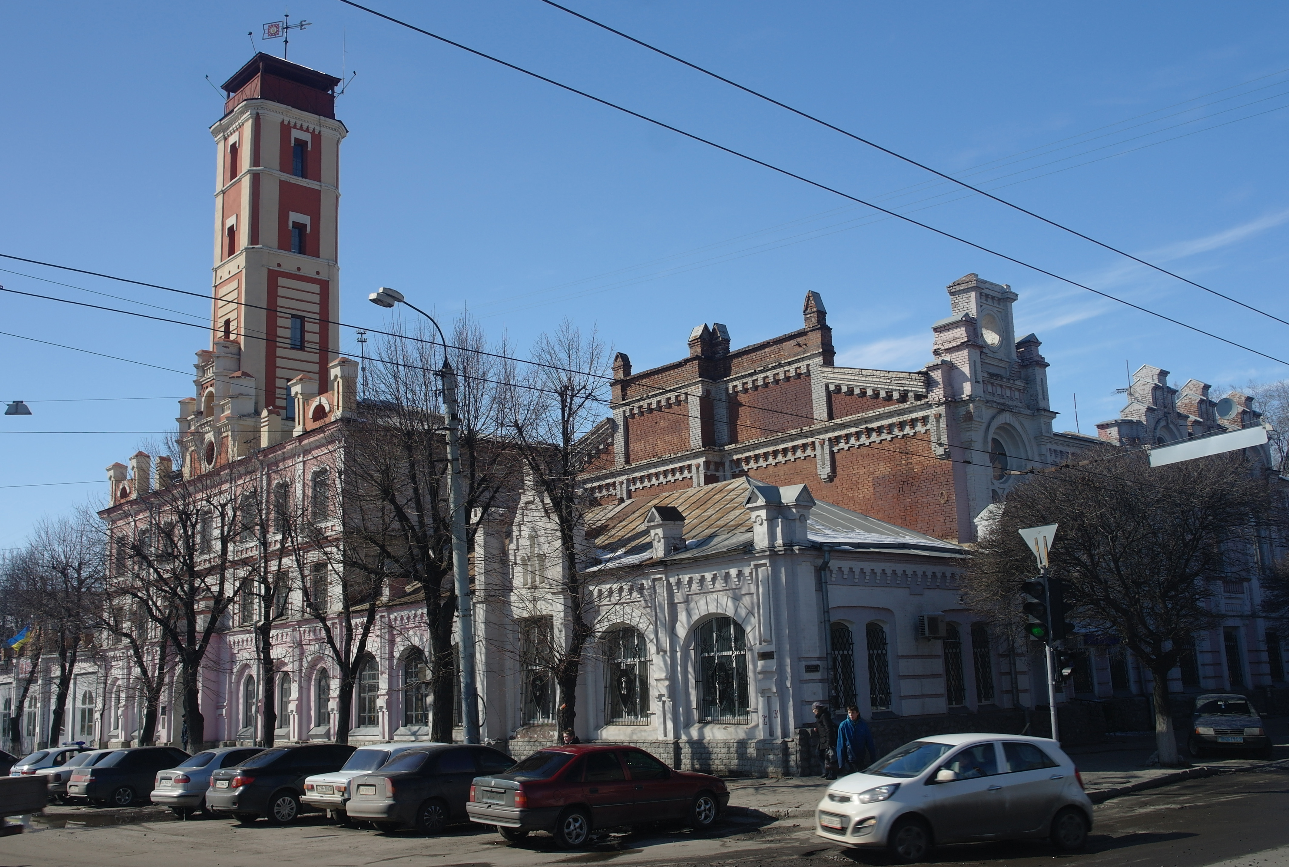 Харків, Полтавський шлях, 30 Пожежне відділення №3